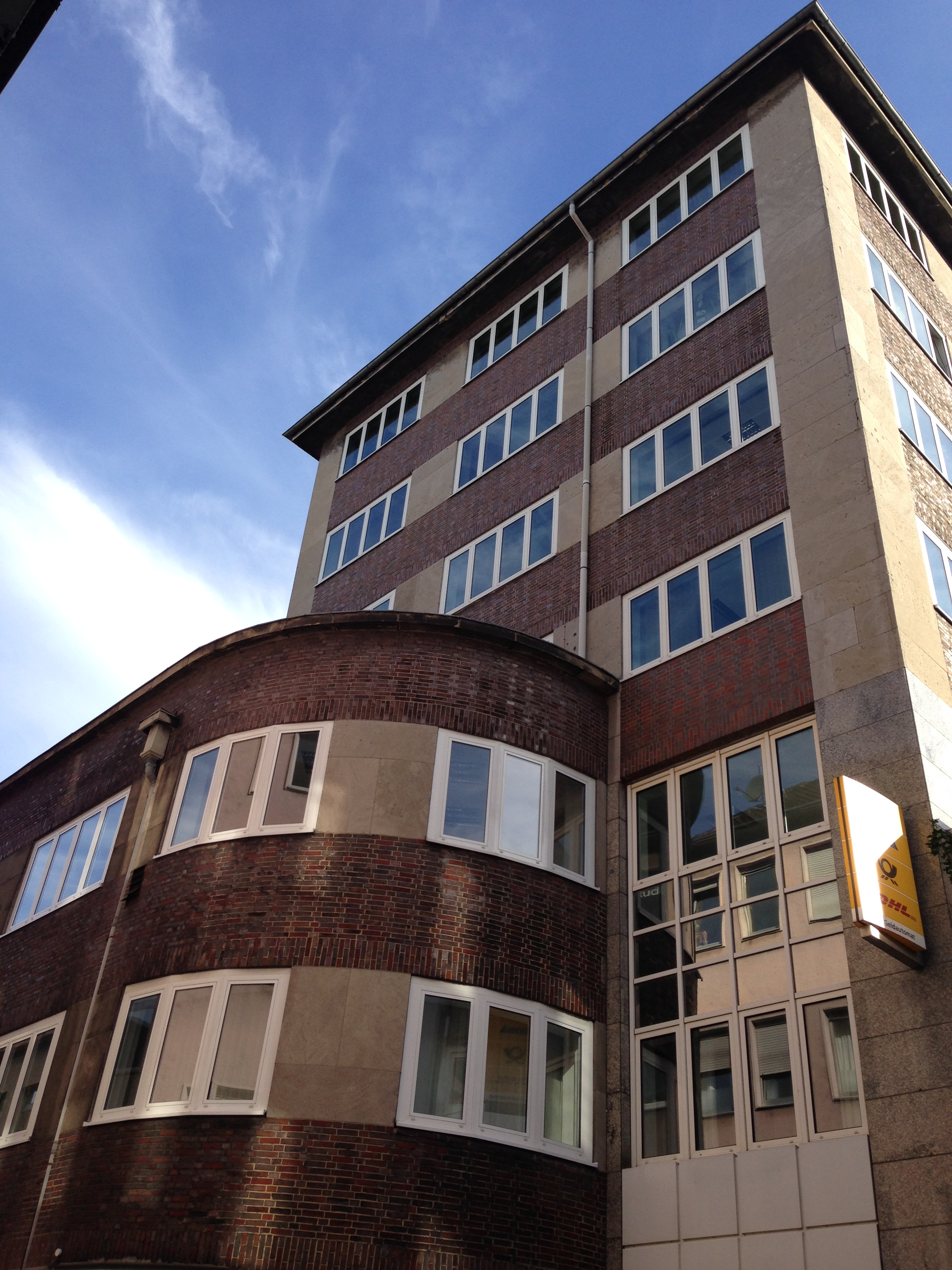 Hauptgebäude der Handwerkskammer Dortmund, Reinoldistraße 7/9 This is a photograph of an architectural monument. 0309